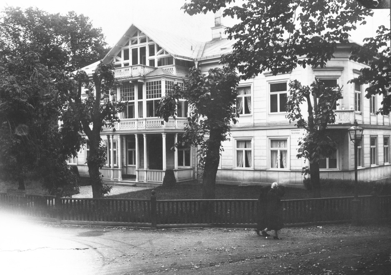 Villa Nannylund Djurgårdsslätten 98